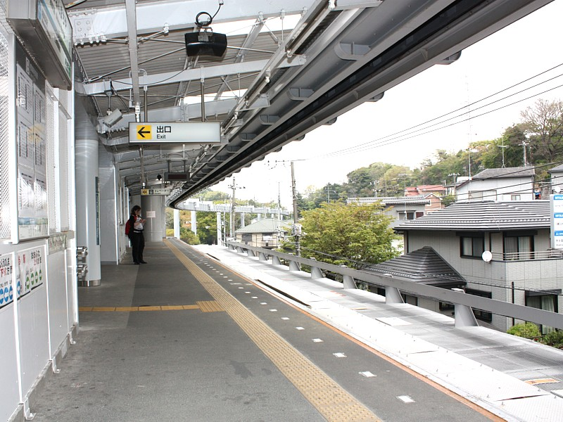 monorail Shōnan, station de Shōnan-Machiya